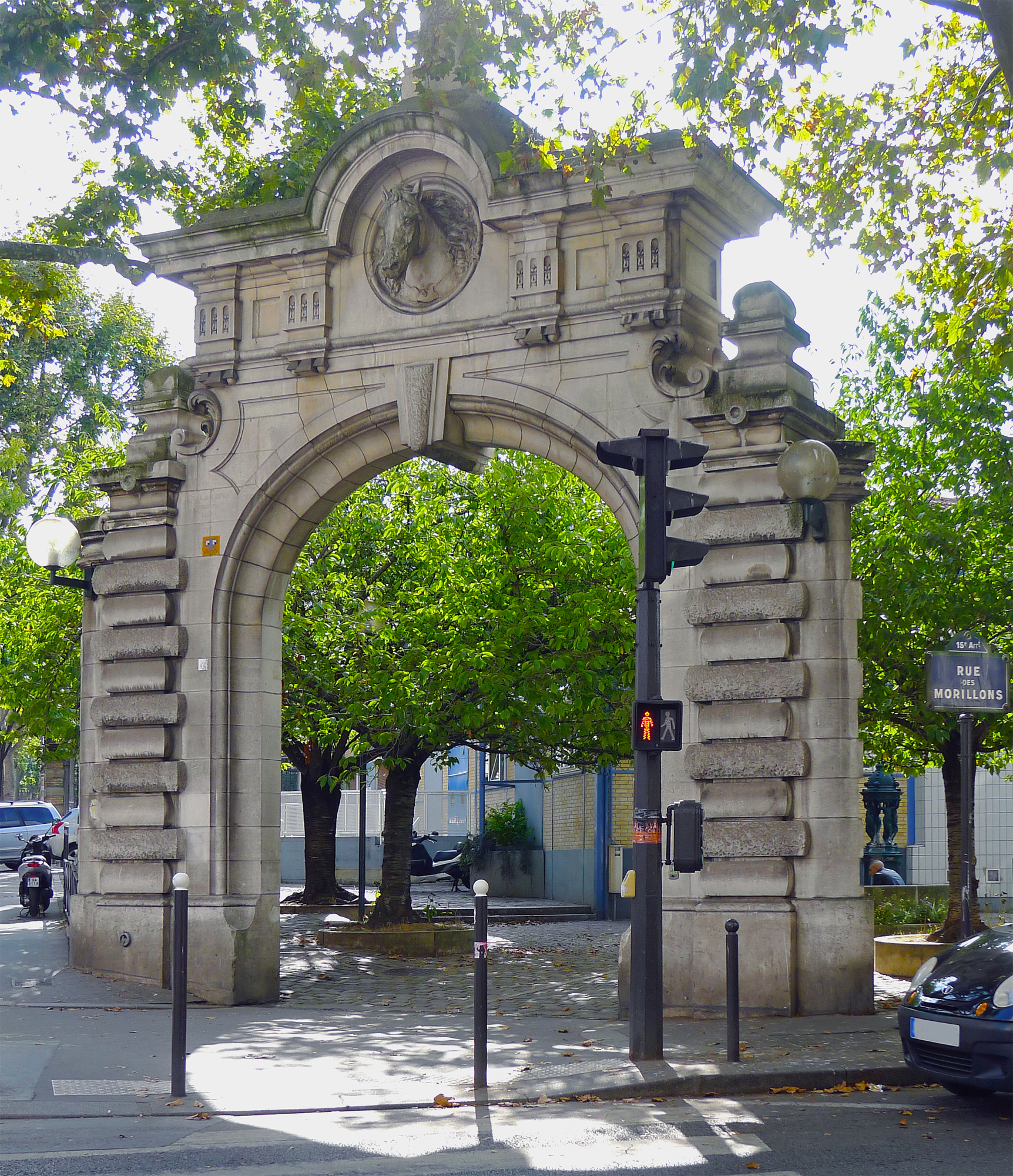 Une des entrées des anciens abattoirs de Vaugirard, à l'angle des rues des Morillons et Brancion - Paris XV